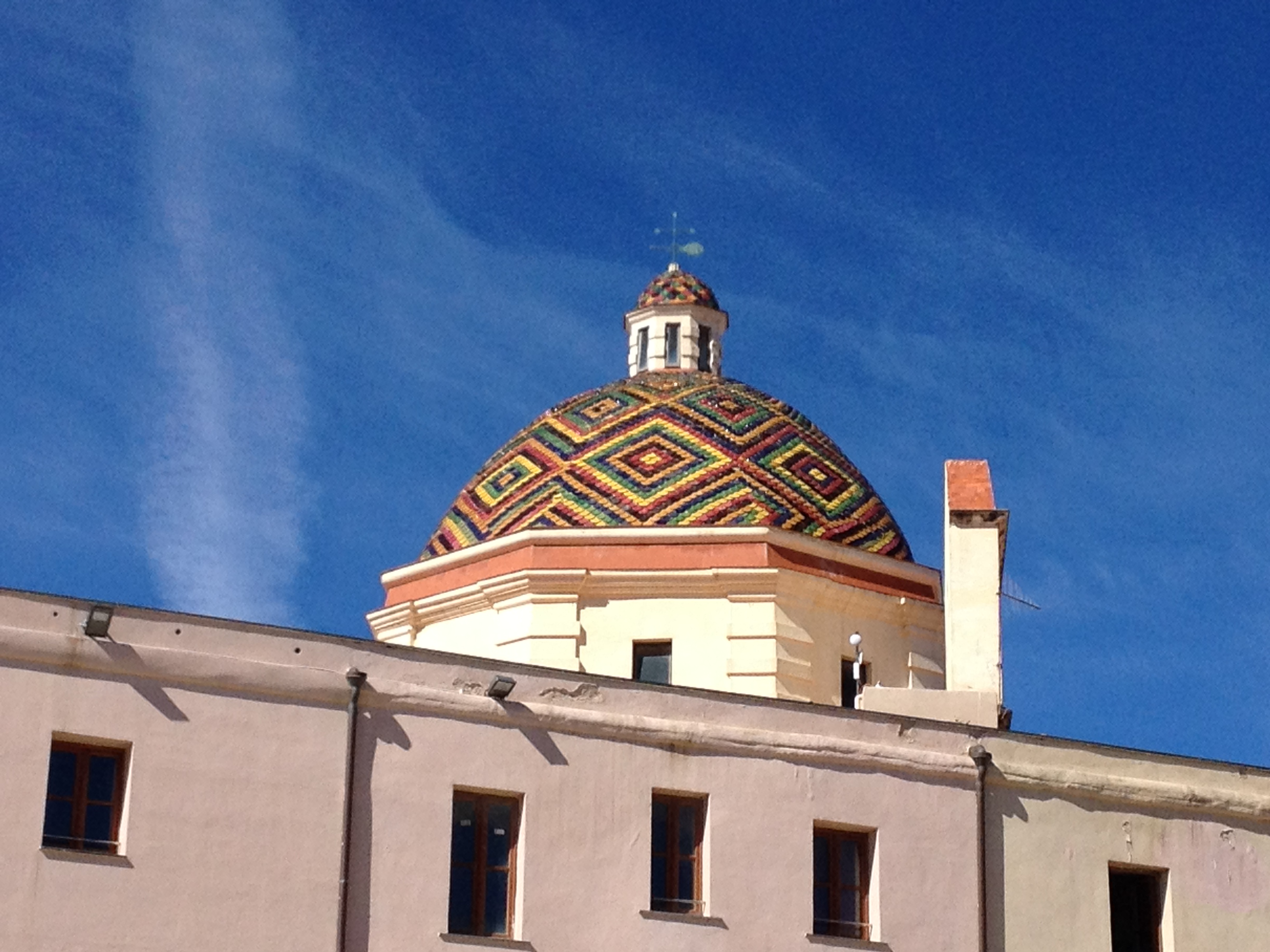 Le dome polychrome de Saint Michel